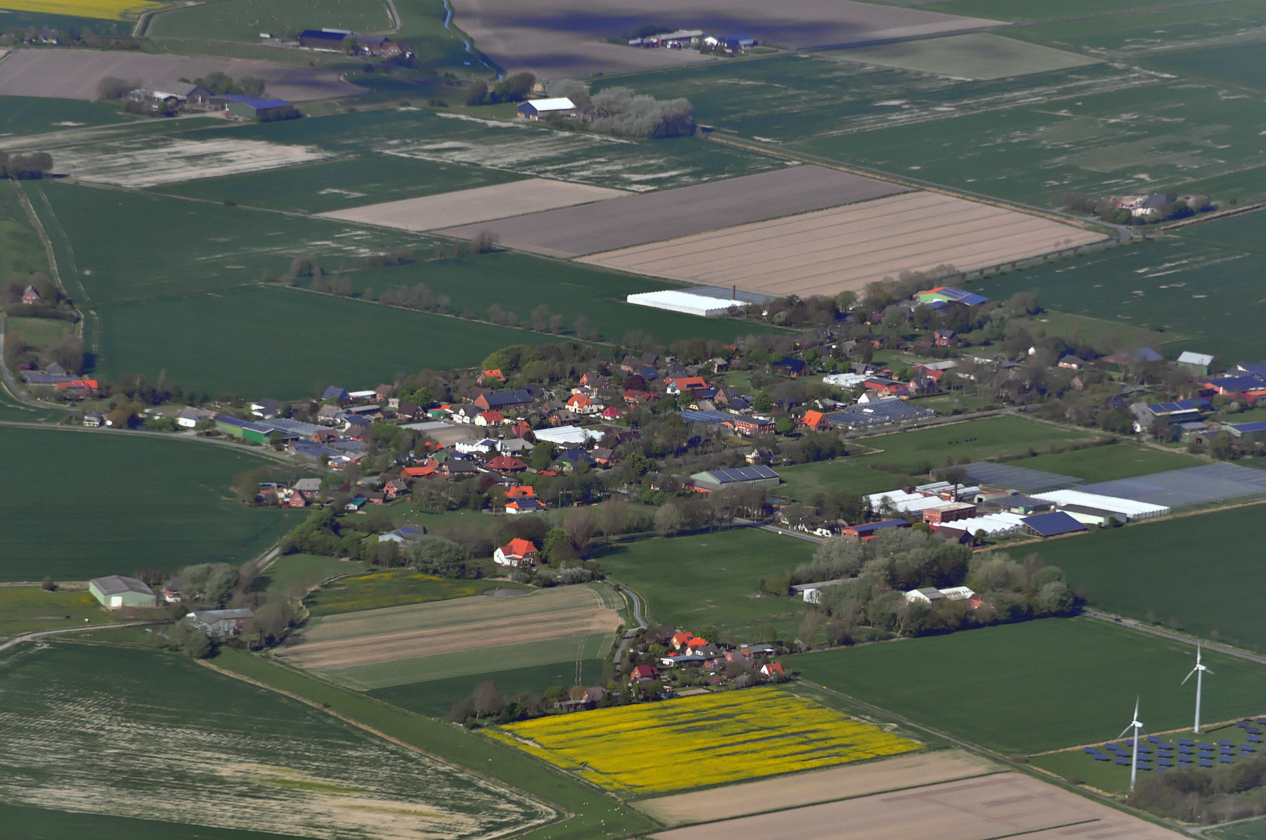 Luftbilder von der Nordseeküste 2012-05